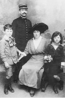 ヴェイユ一家。マイエンヌにて